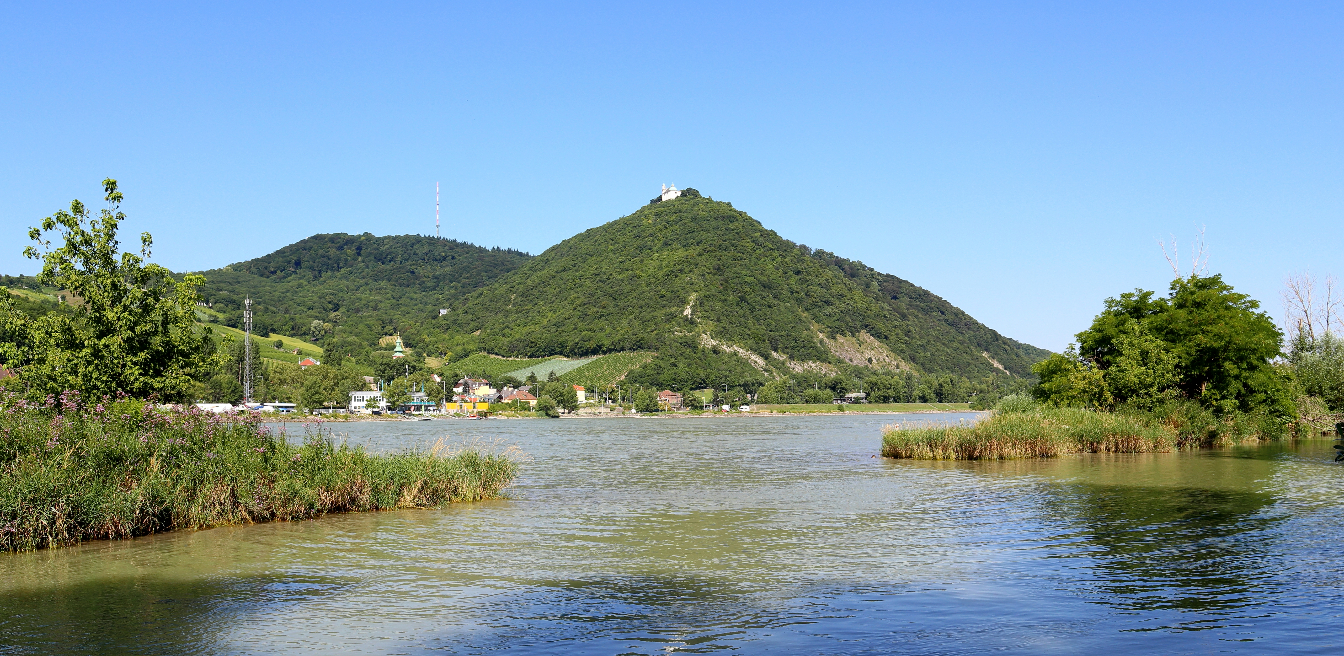 Ostsüdostansicht des 425 Meter hohen Leopoldsberges im 19. Wiener Gemeindebezirk Döbling mit der Leopoldsbergkirche. Im Vordergrund die Donau, links der Ort Kahlenbergerdorf und dahinter der 484 Meter hohen Kahlenberg mit dem Sender Kahlenberg.